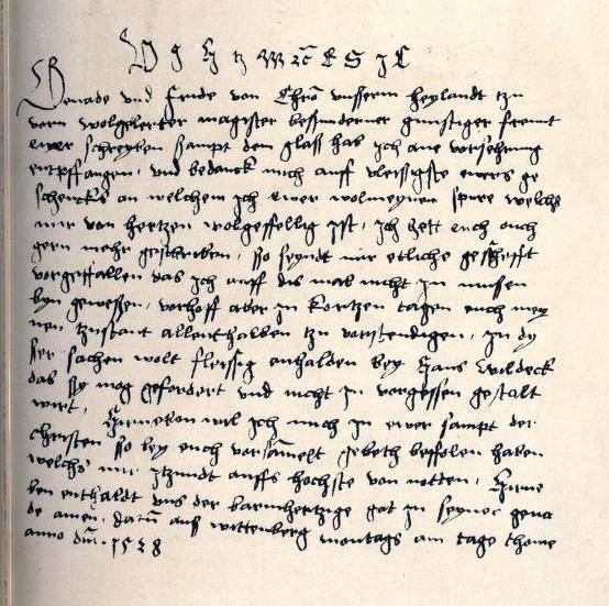 Brief von Herzogin Ursula von Münsterberg an Magister Stephan Roth vom 21. Dezember 1528 aus Wittenberg